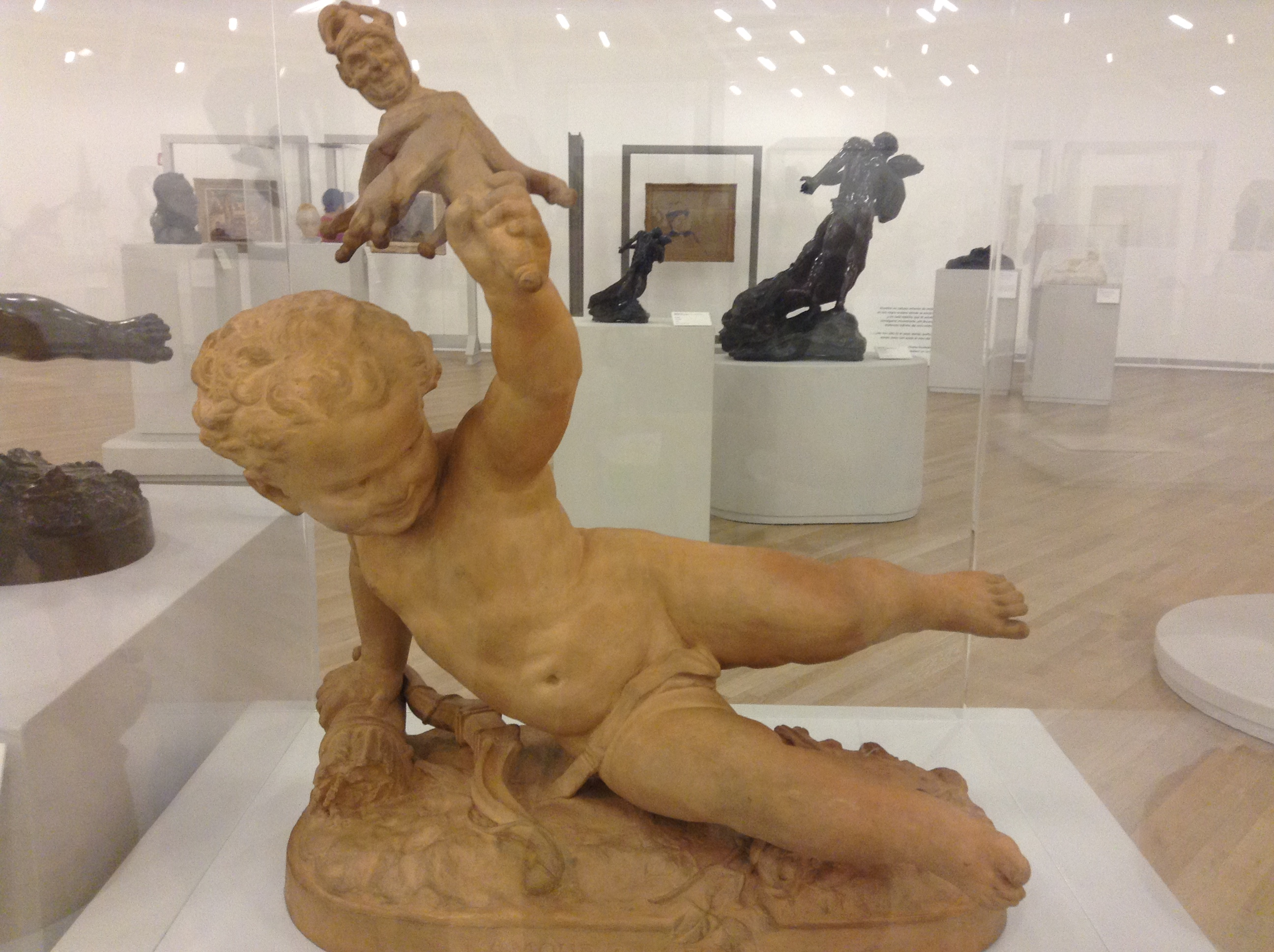 La obra "L'amour à la folie", original en terracota, de Jean Baptiste Carpeaux, expuesta en el museo Soumaya.